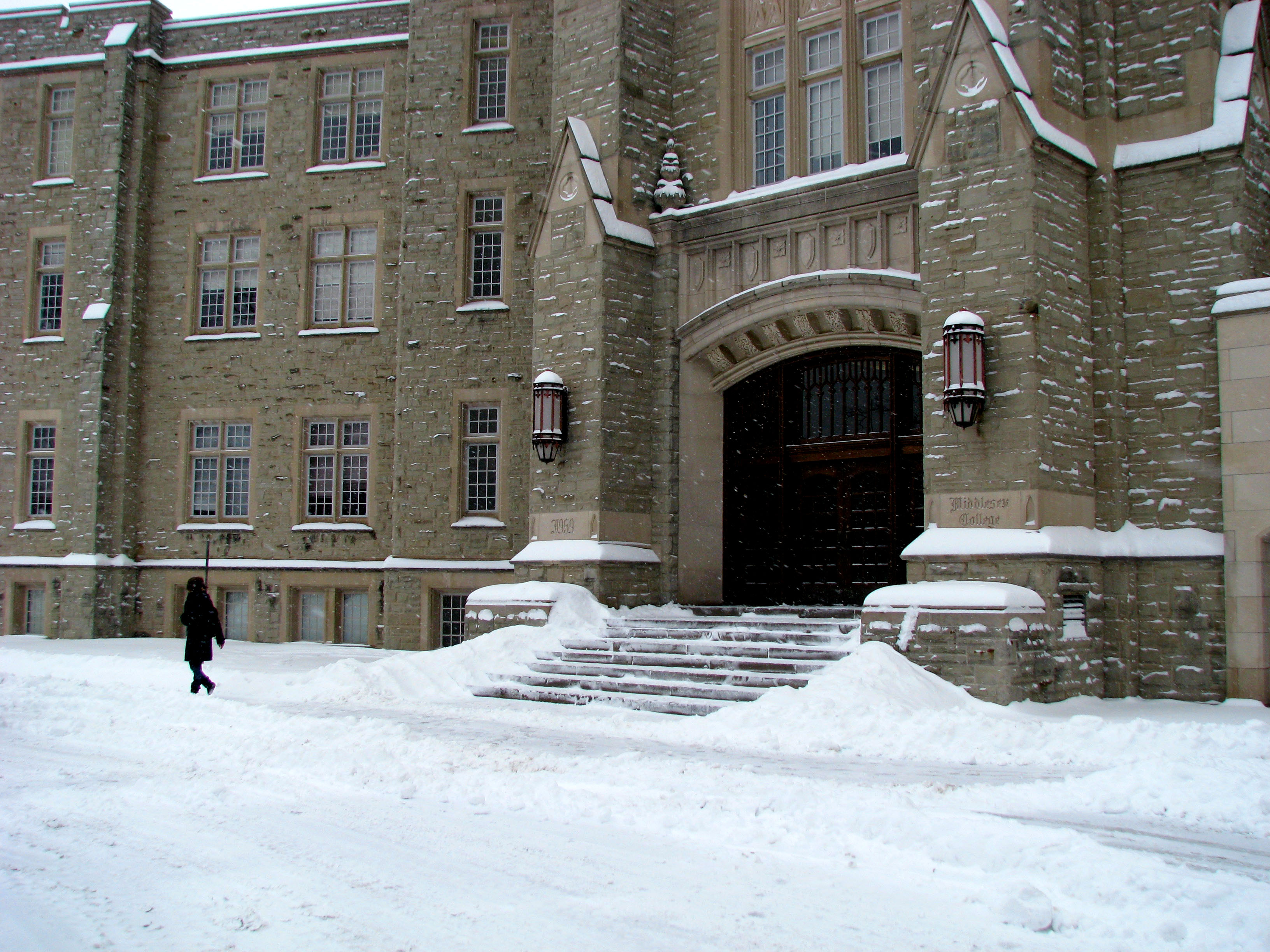 Middlesex